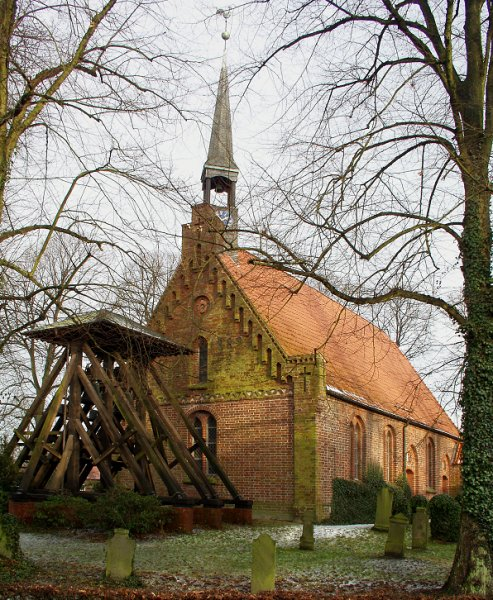 Kirche von Seester (Schleswig-Holstein)